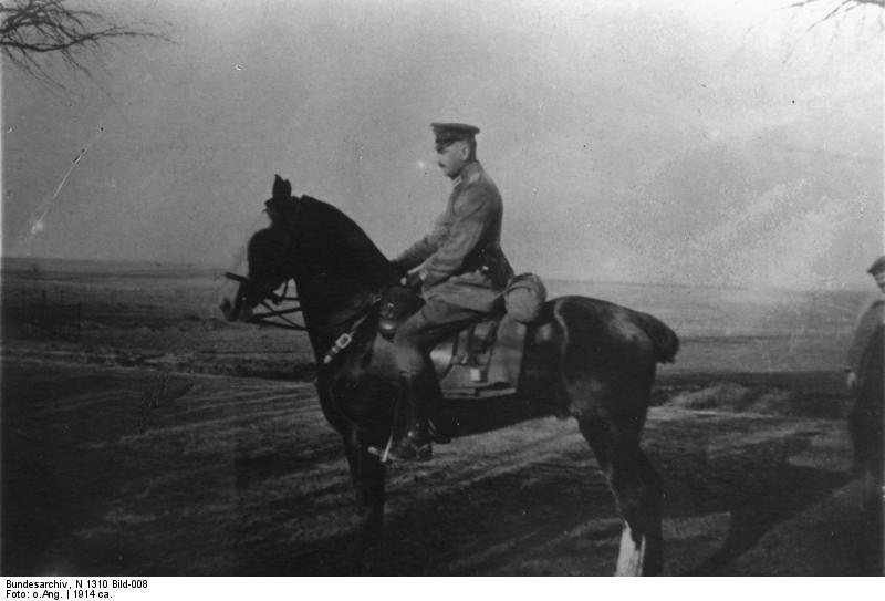 Konstantin von Neurath in Uniform zu Pferd 1914 im Felde als Hauptmann und [?]adjudant, wahr. 1914 [Konstantin Freiherr von Neurath als Hauptmann auf Pferd reitend] Abgebildete Personen: Neurath, Konstantin von Freiherr: Außenminister, Reichsprotektor für Böhmen und Mähren, Deutschland (PND 118786016)